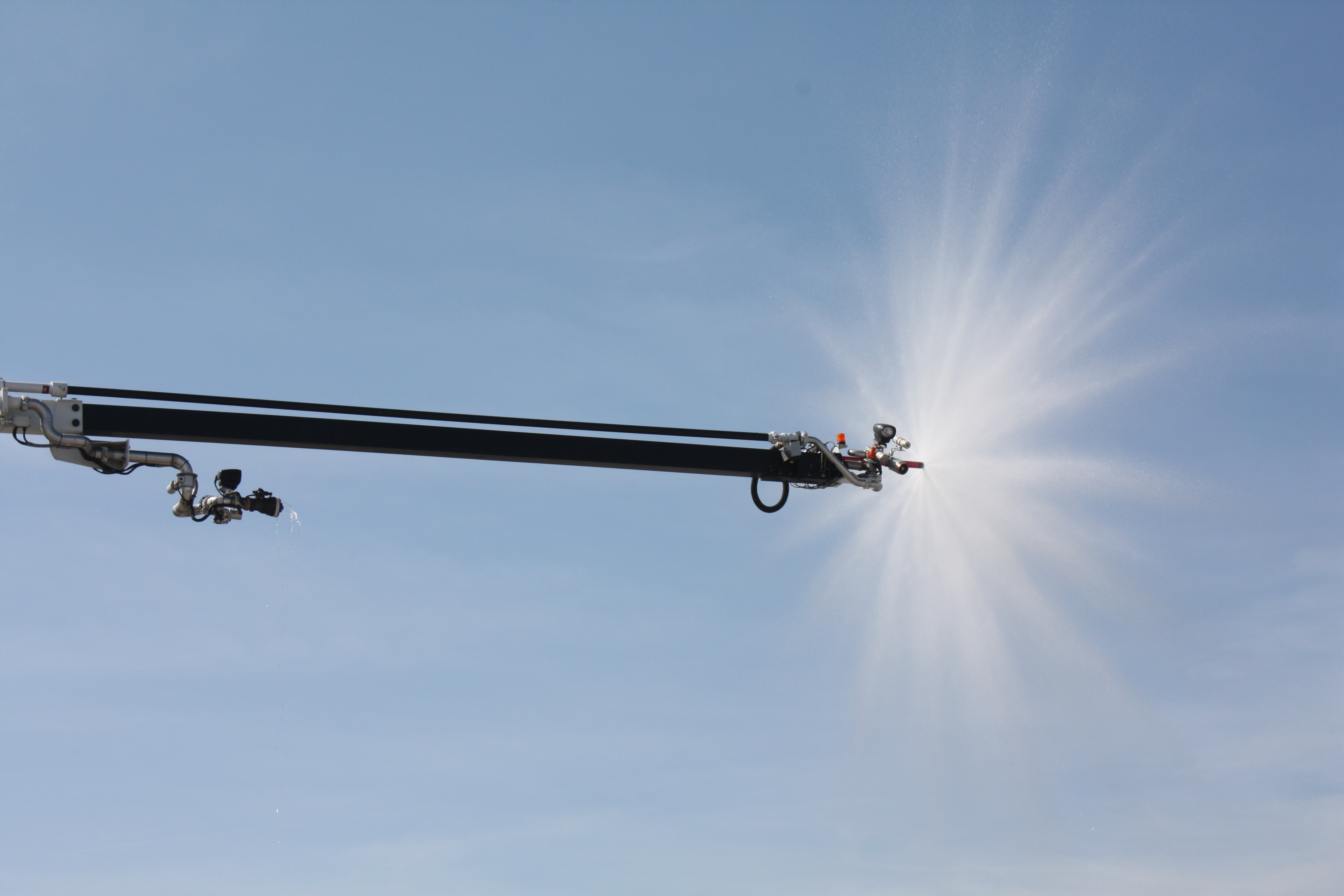 Flugfeldlöschfahrzeug Ziegler Z8, Flughafen München. Sprühdüse am Ausleger im Einsatz.